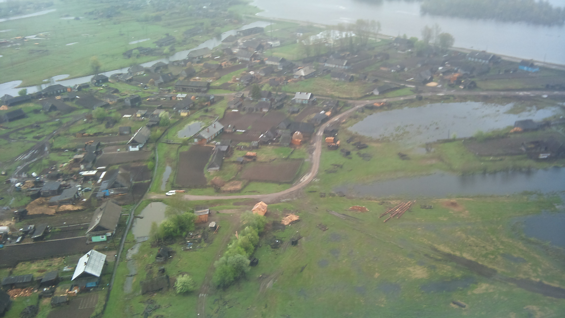 Parabelskiy r-n, Tomskaya oblast', Russia